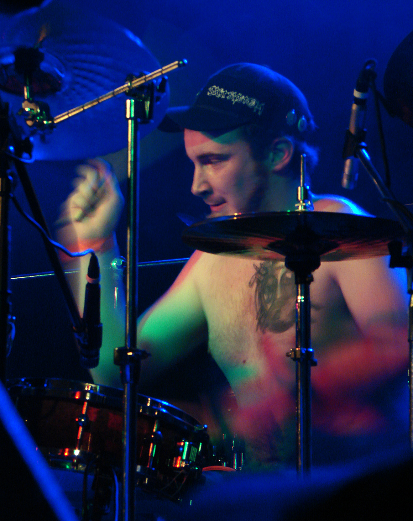 Benighted au Chaulnes Fest 08, le 22/03/08: Kevin.